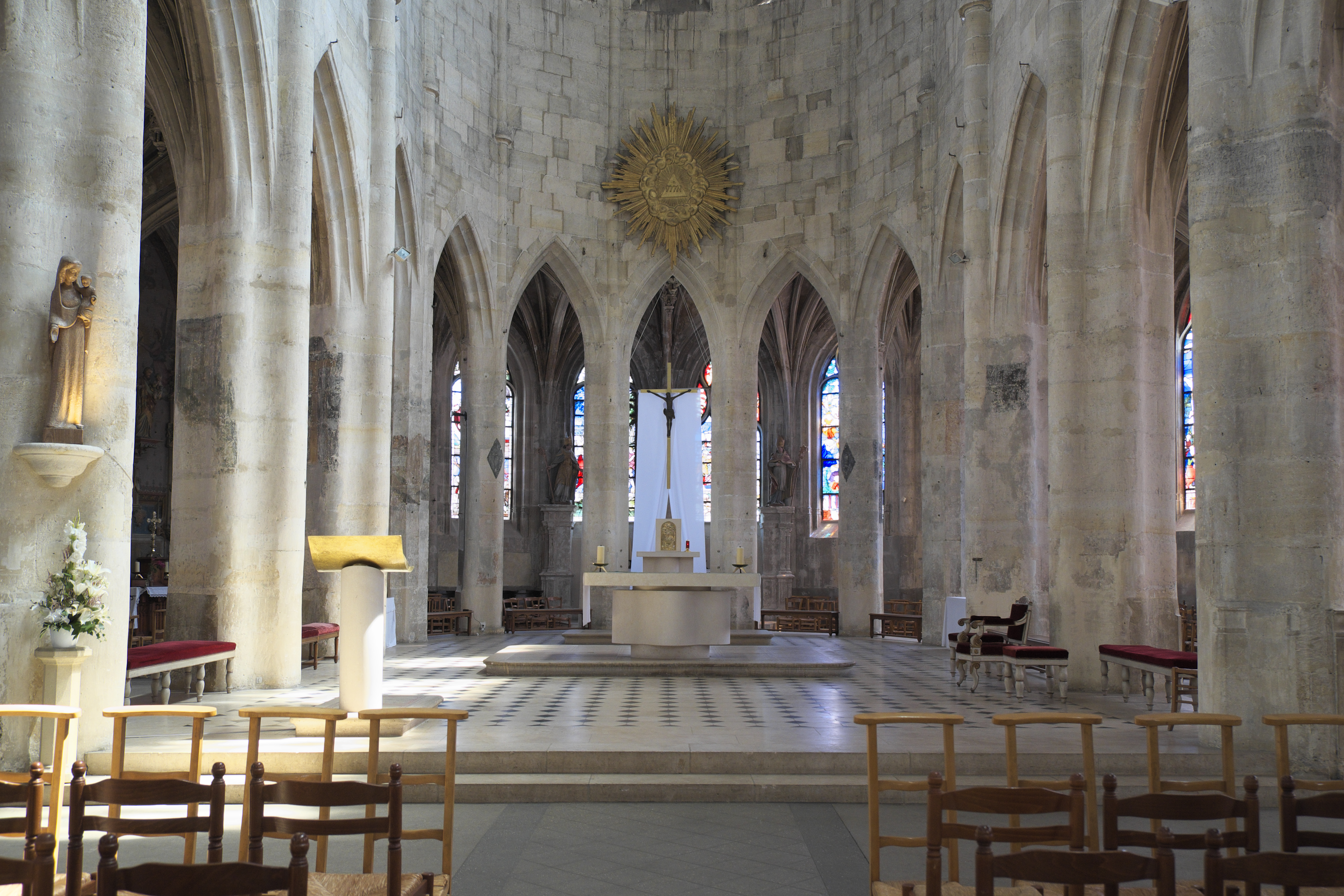 Katholische Pfarrkirche Saint-Pierre in Montfort-l'Amaury im Département Yvelines (Region Île-de-France/Frankreich), Chor